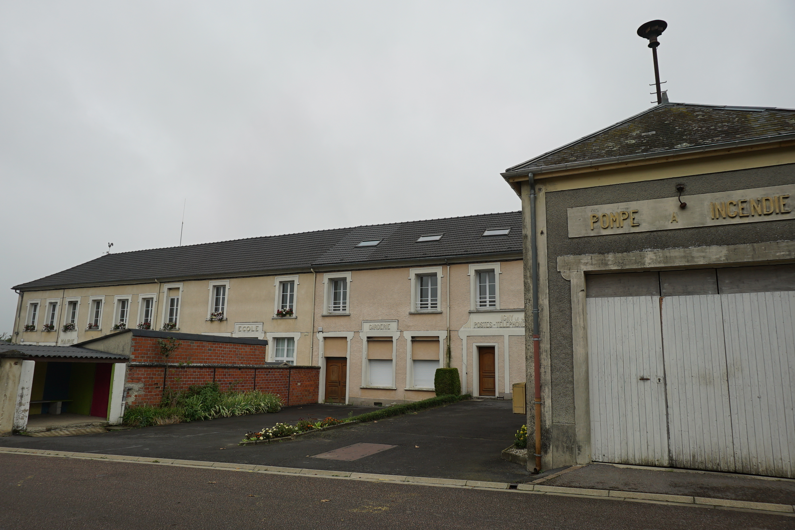 La Mairie, la Poste, le local des pompiers, l'école à Igny-Comblizy.